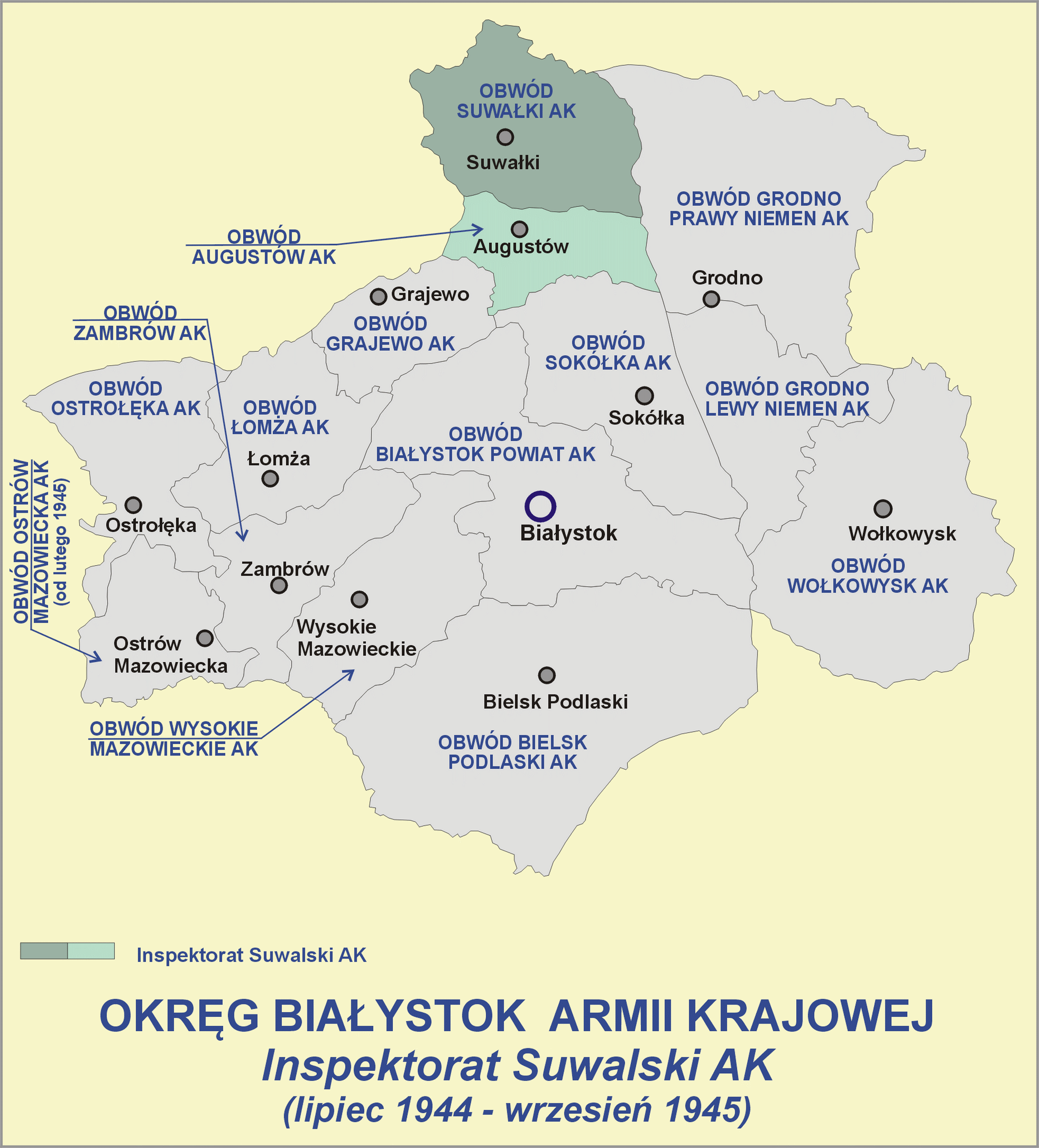 Okręg Białystok AK - Inspektorat Suwalski AK (lipiec 1944 - wrzesień 1945)